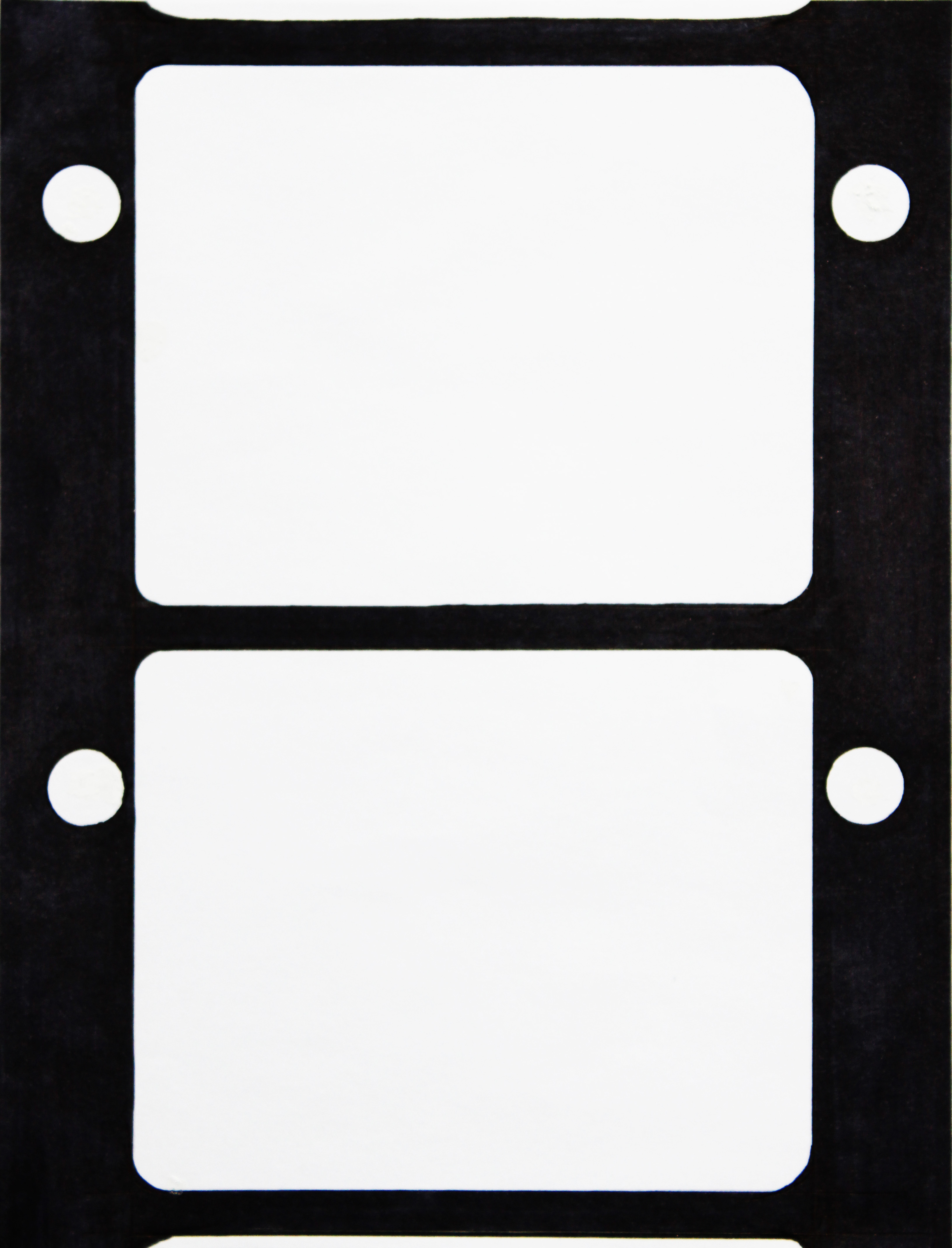 Modèle pellicule cinéma Lumière